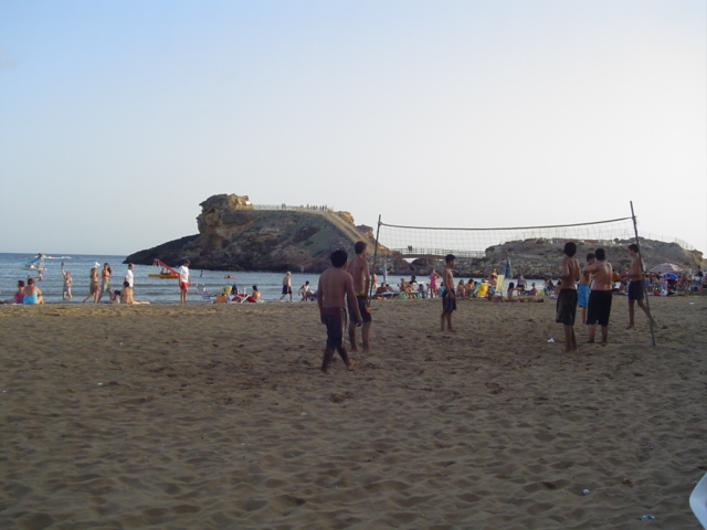 Bahía Beach, in Mazarrón, Murcia, Spain.